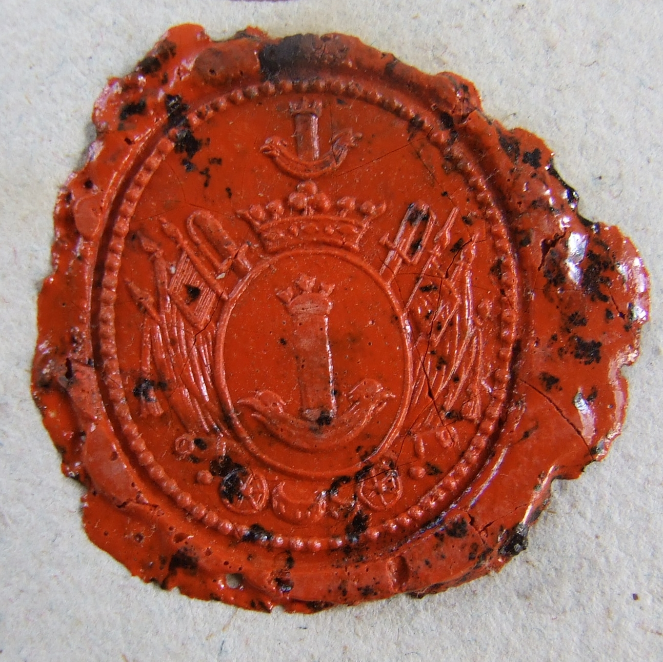 Pieczęć Wincentego Rulikowskiego na dokumencie z 1798 roku